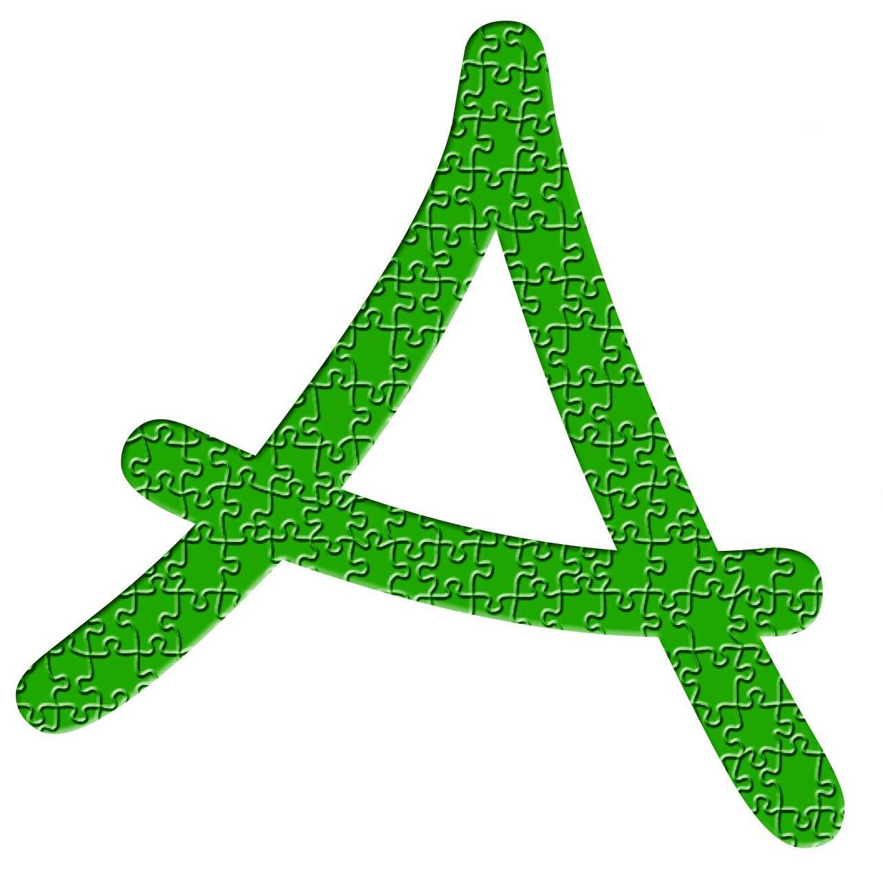 Logotipo de Radio Altisima FM